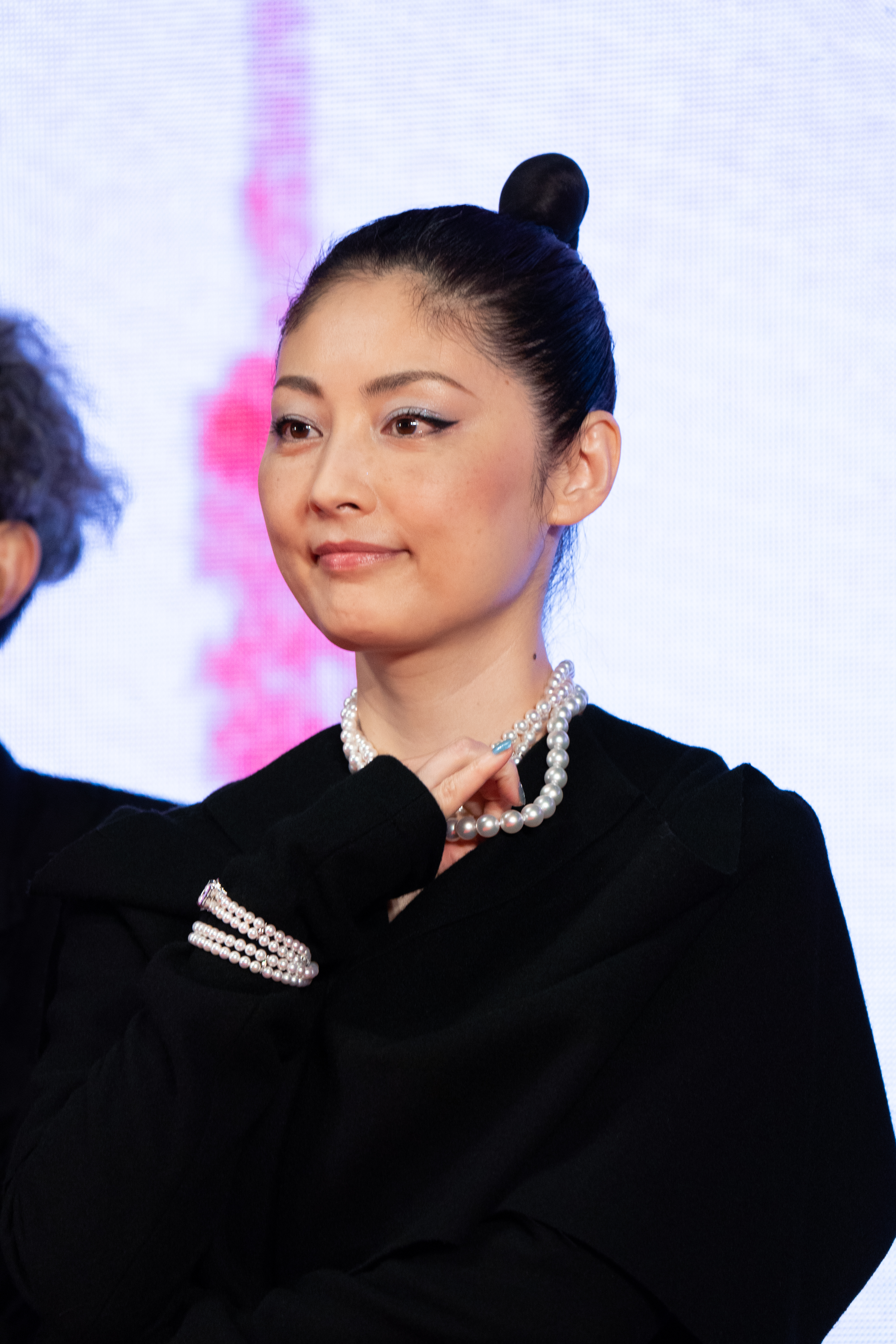 第32回 東京国際映画祭 オープニングセレモニー 常盤貴子 (海辺の映画館―キネマの玉手箱)